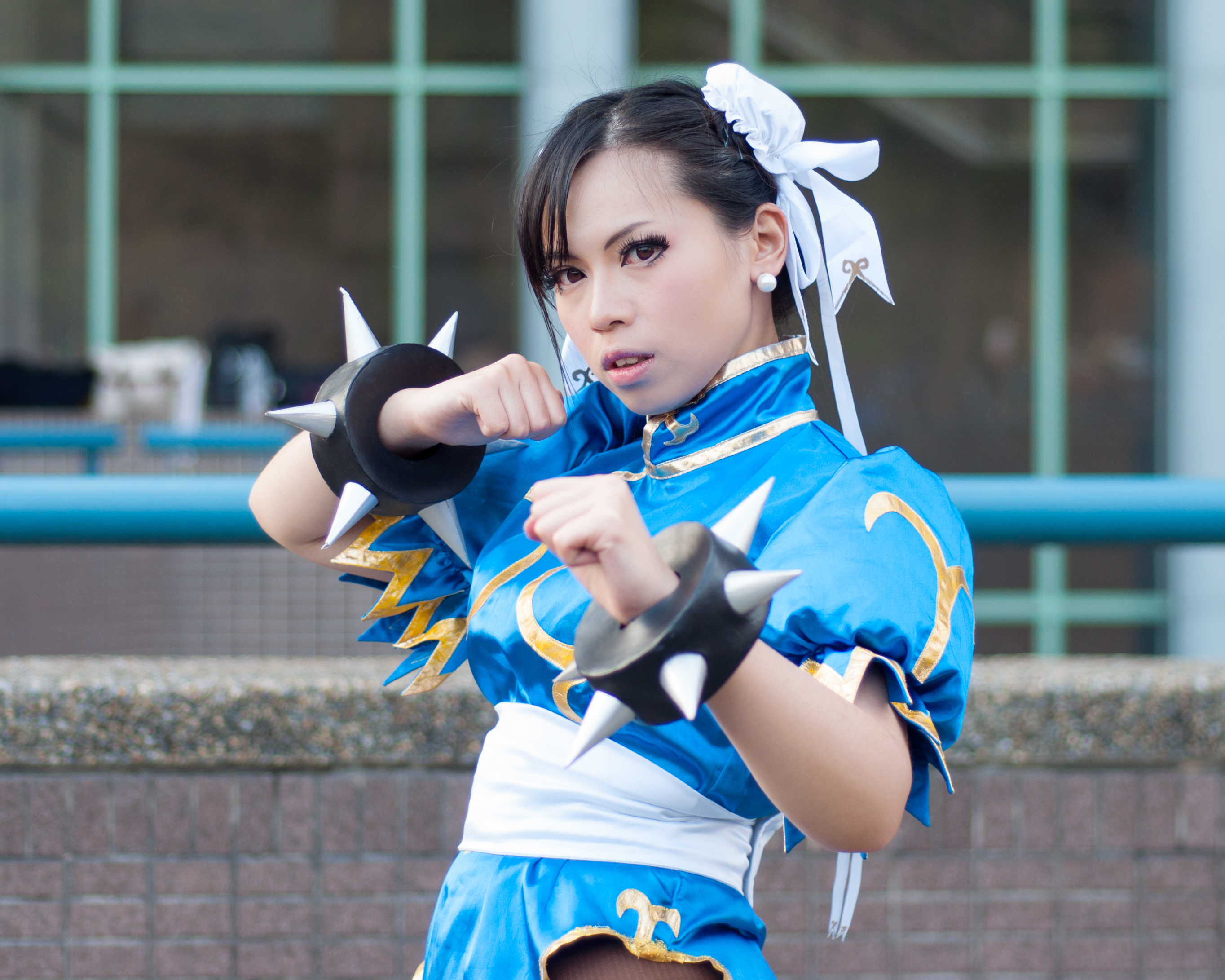 第23屆開拓動漫祭，《Street Fighter系列》春麗cosplayer。